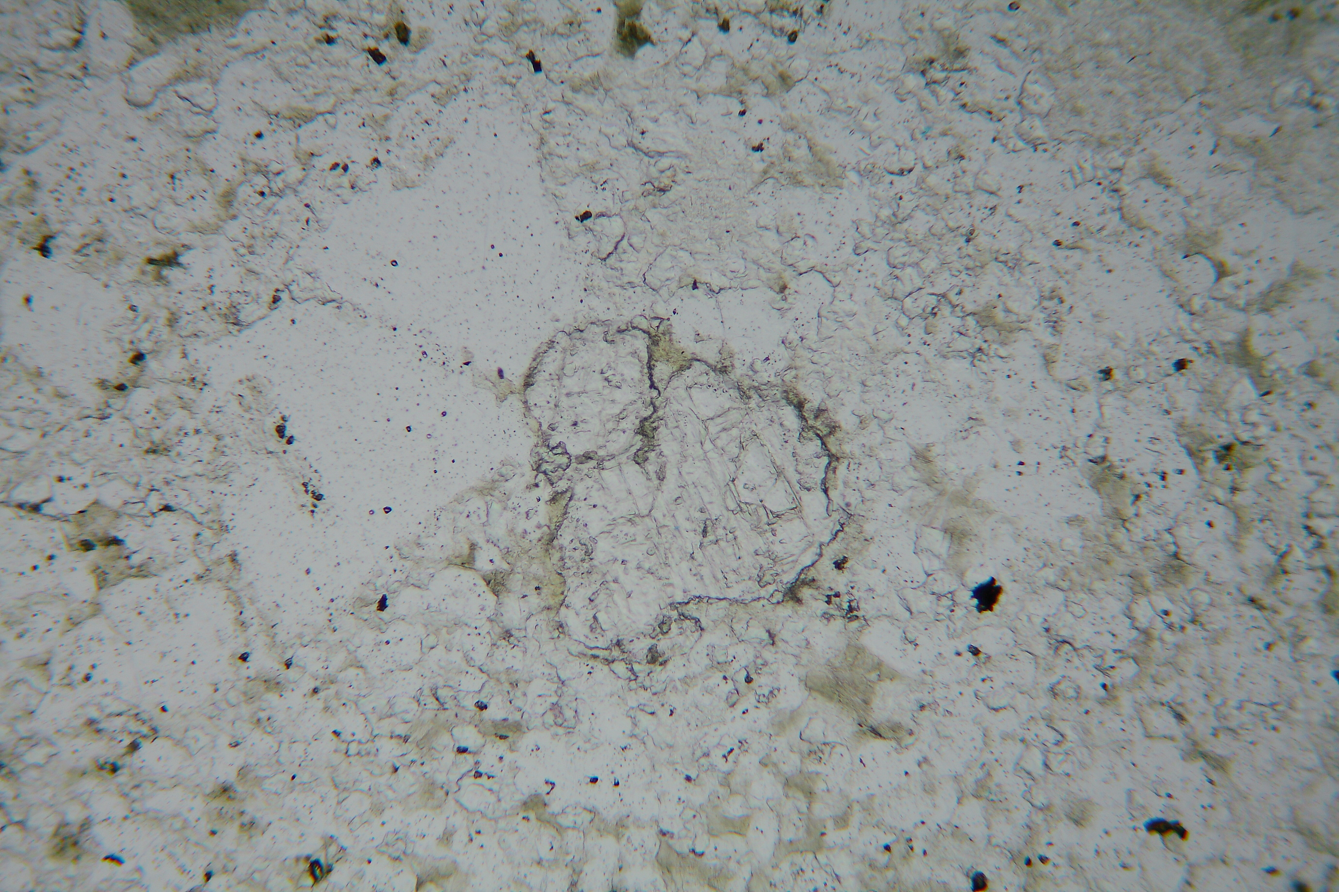 Fluorit (Dünnschliff, LPL) in einem Greisen (Sadisdorf, Erzgebirge): Auffällig ist das starke, negative Relief, verursacht durch den sehr niedrigen Brechungsindex